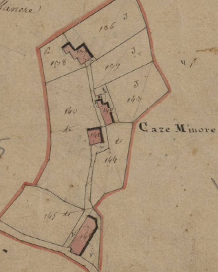 Casa Menora, de Serrallonga, en el Cadastre napoleònic del 1812 (Arxius Departamentals dels Pirineus Orientals)